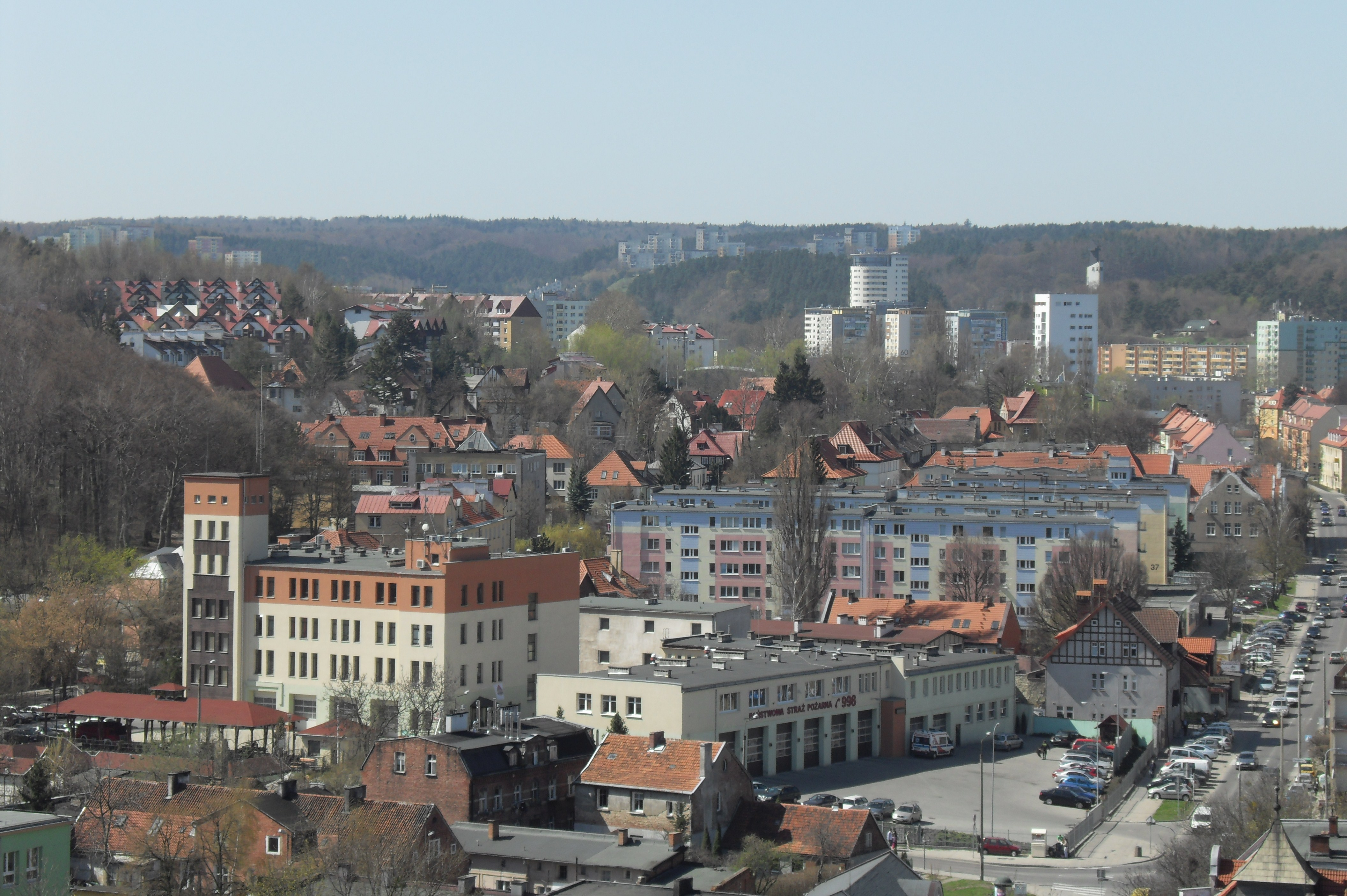 Gdańsk Wrzeszcz Górny.